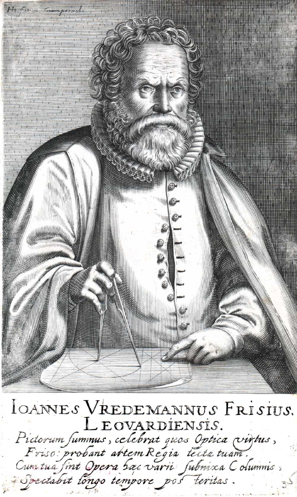 Hans Vredeman de Vries (1527 - c. 1604)